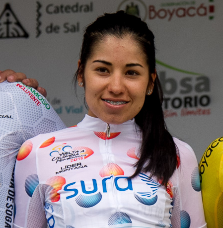 Paula Patiño en el podio de la tercera etapa de la Vuelta a Colombia Femenina 2018